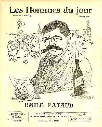 Les Hommes Du Jour N° 67. Emile Pataud.